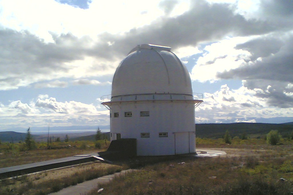 Павильон телескопа АЗТ-33ИК, расположенный в Саянской солнечной обсерватории ИСЗФ СО РАН (Россия, р.Бурятия)